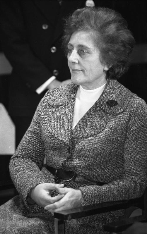 Empfang "25 Jahre Bundes-CDU" im Konrad-Adenauer-Haus, Bonn